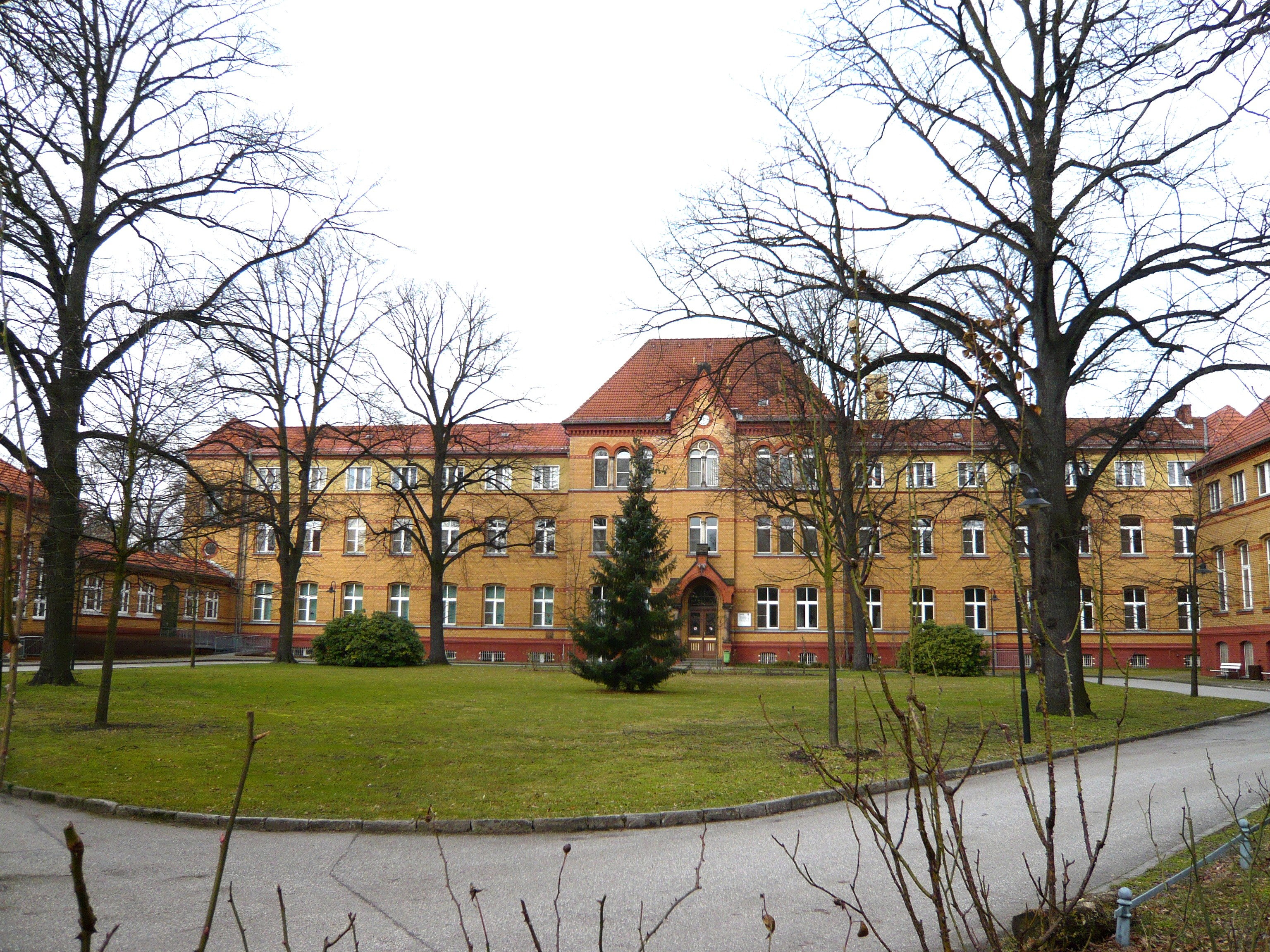 Kinderklinik Lindenhof in der Gotlindestr., Hofansicht des Haupthauses